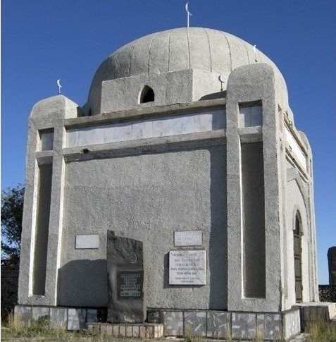 Қазақша (кирил): Мавзолей Жалантос батыра Кулыкулы. Южнее города Караганда. 1996 года постройки